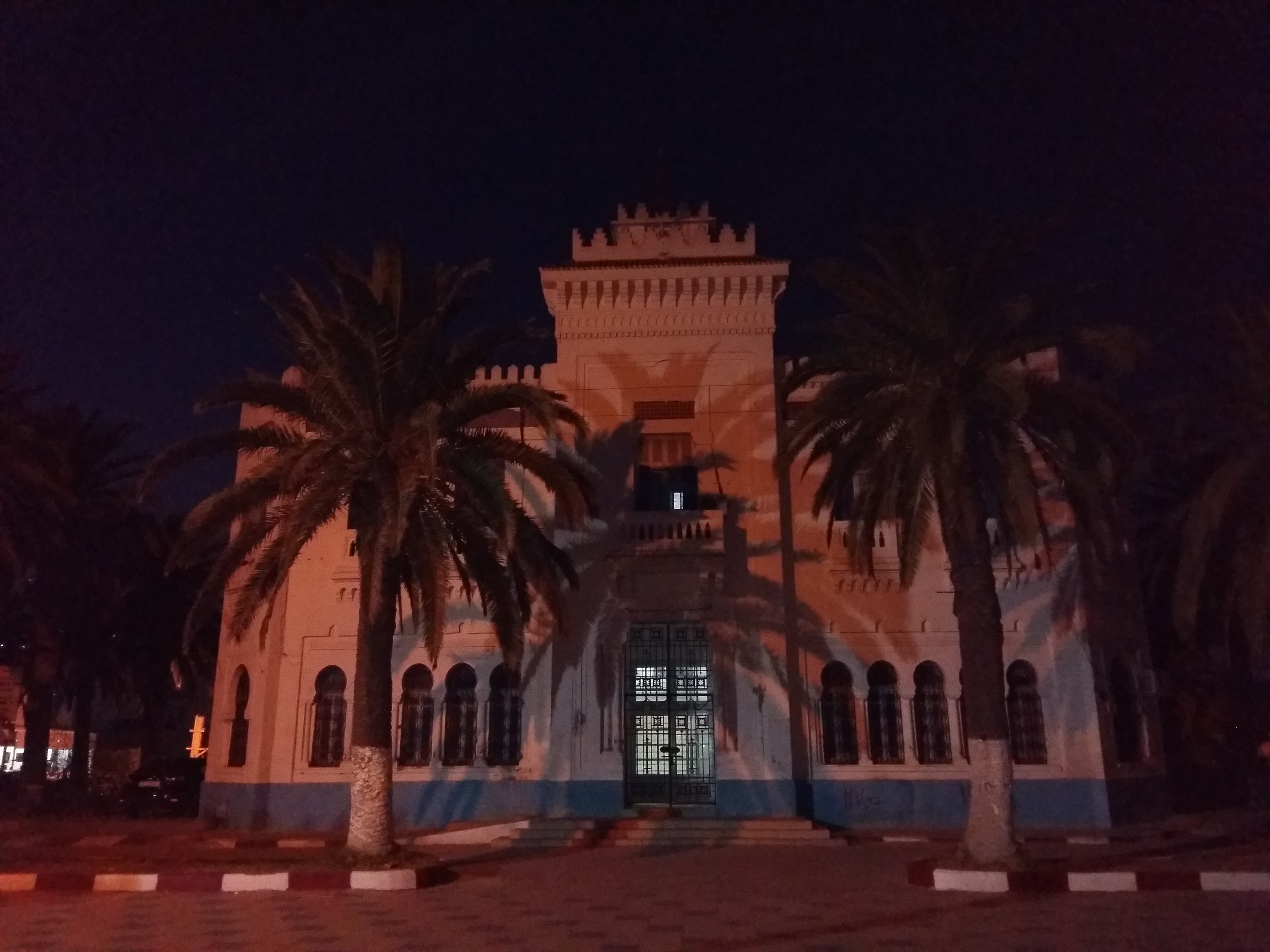 municipalité de rades